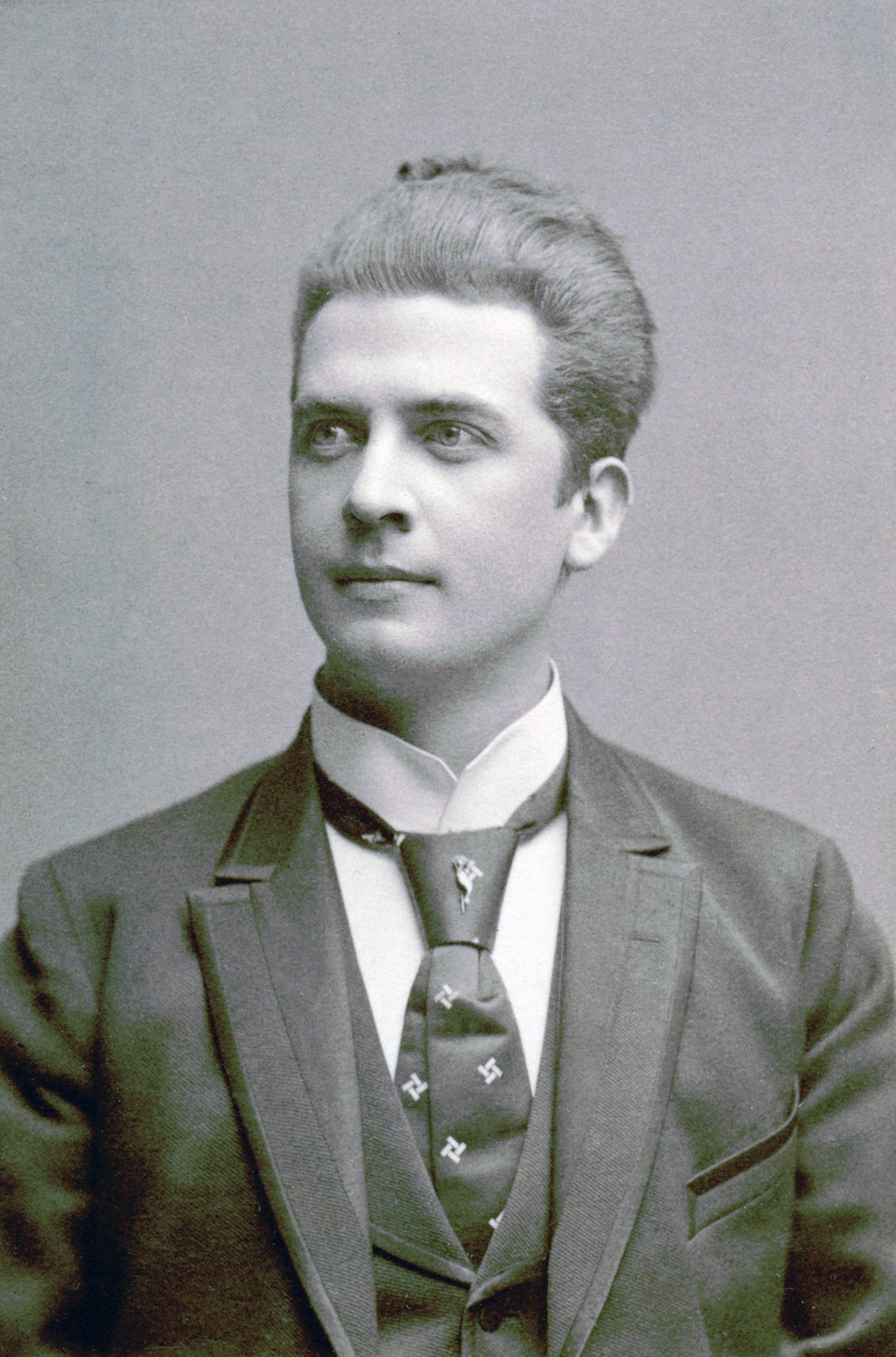 Oscar Johansson, sångare vid Kungliga Operan 1890